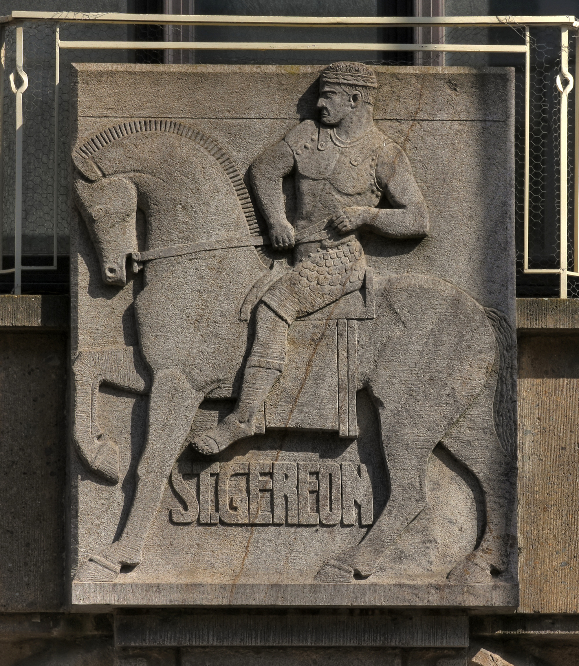 Gereonshaus, Gereonstraße 18-32, Köln. Architekt: Carl Moritz, Baujahr: 1909/10